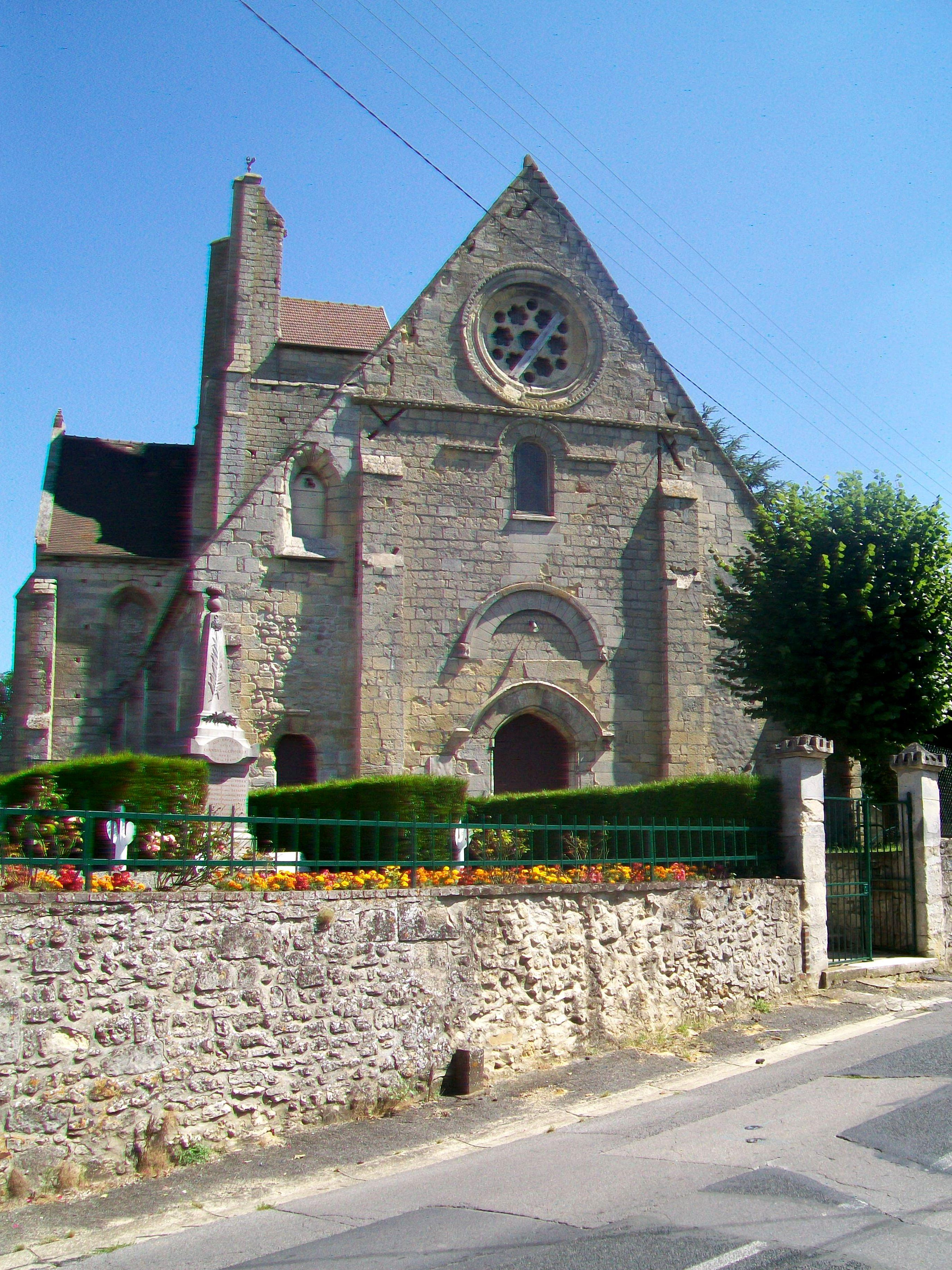 La façade occidentale.